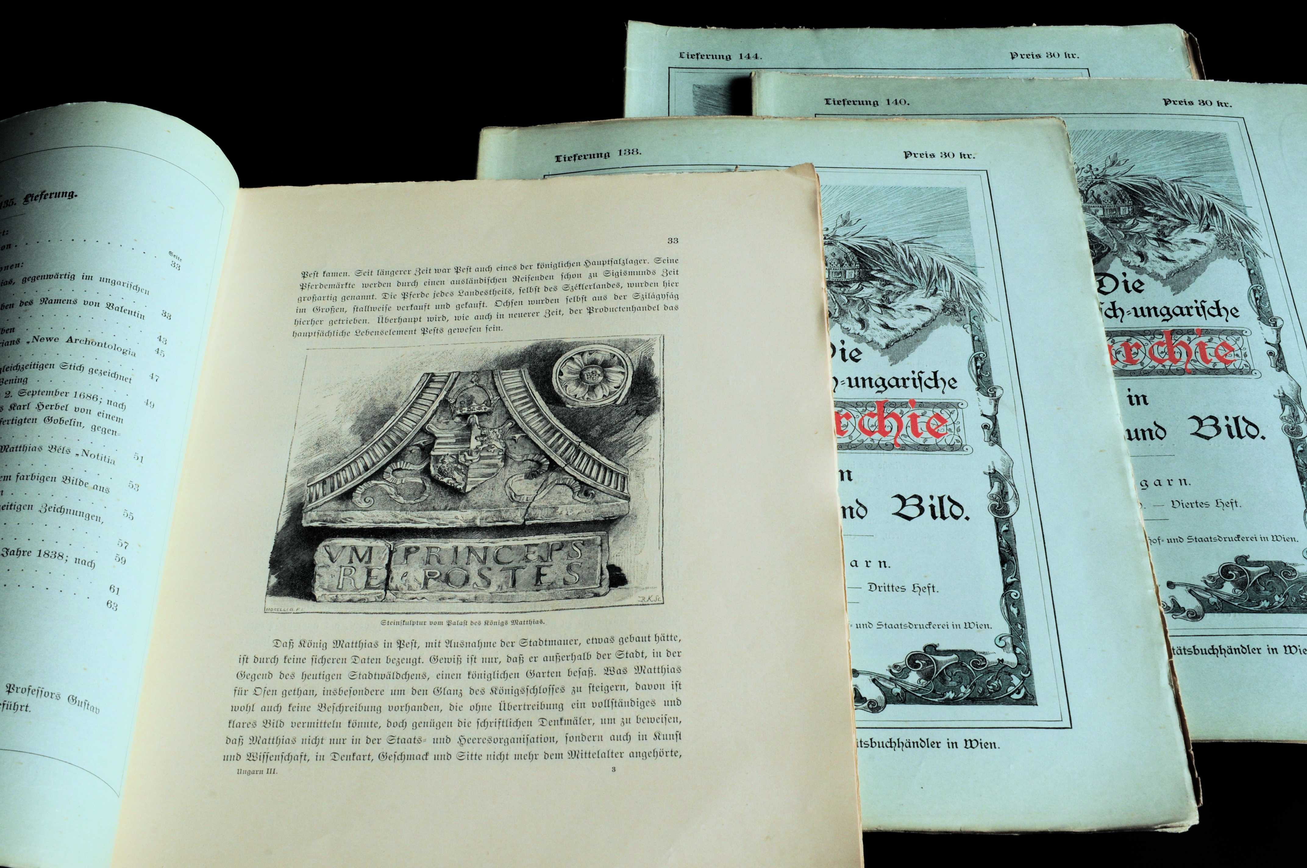 Einzelne Lieferungen in Lagenform und mit Interimsumschlag in einem Fortsetzungswerk (Kronprinzenwerk, Band 12: Ungarn III, 1893), Druck: k.k. Hof- und Staatsdruckerei; Vertrieb: Alfred Hölder, k. und k. Hof- und Universitätsbuchhändler in Wien